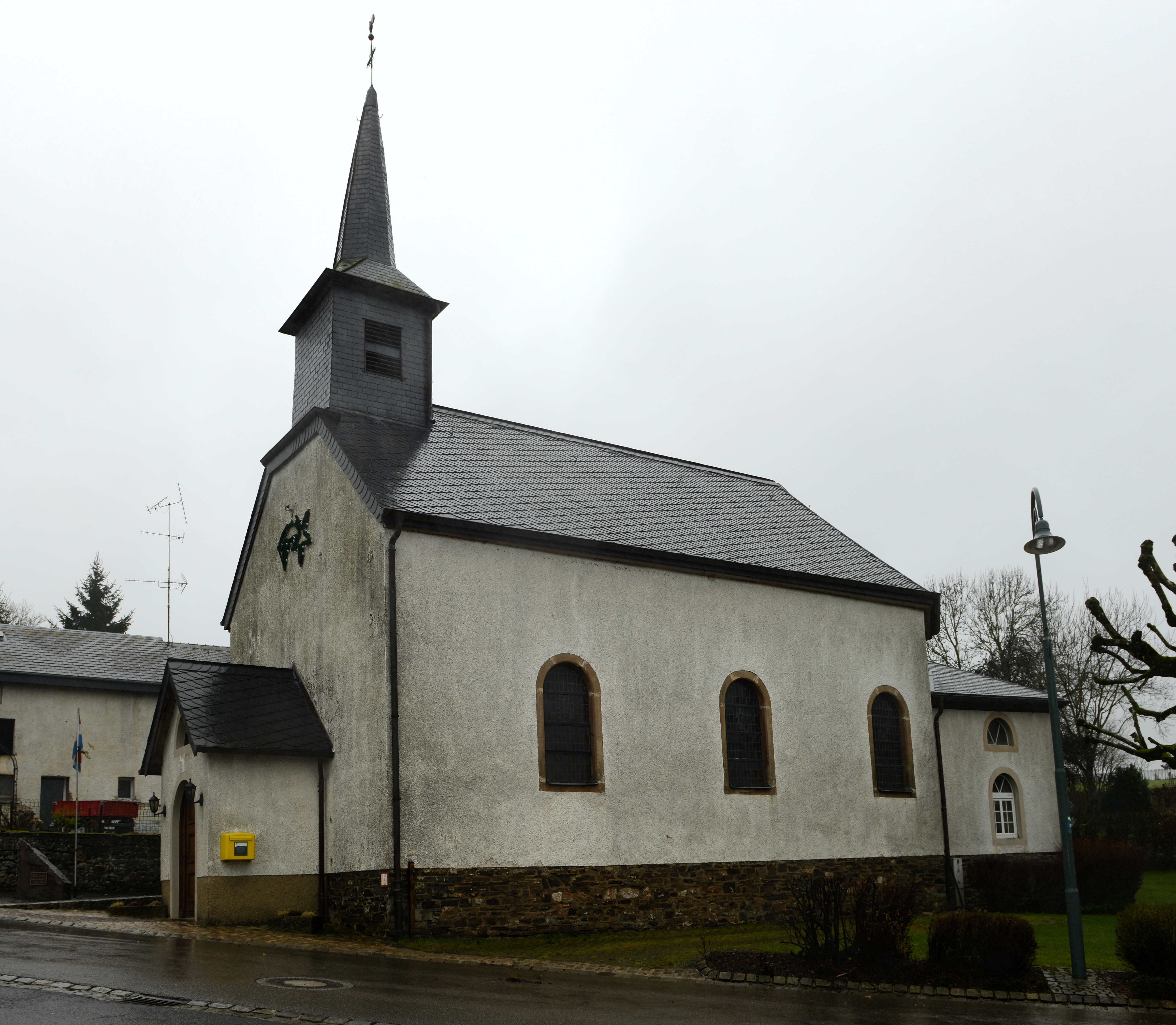 D'Kierch zu Rueder op engem reenegen Dag am Dezember.